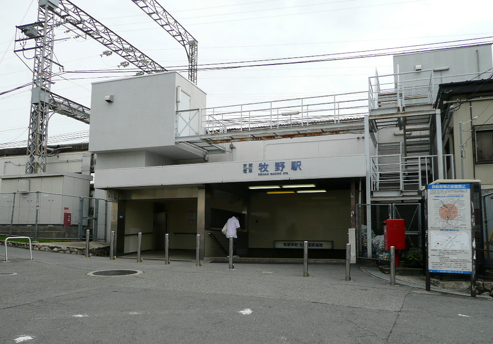 京阪電気鉄道京阪本線牧野駅